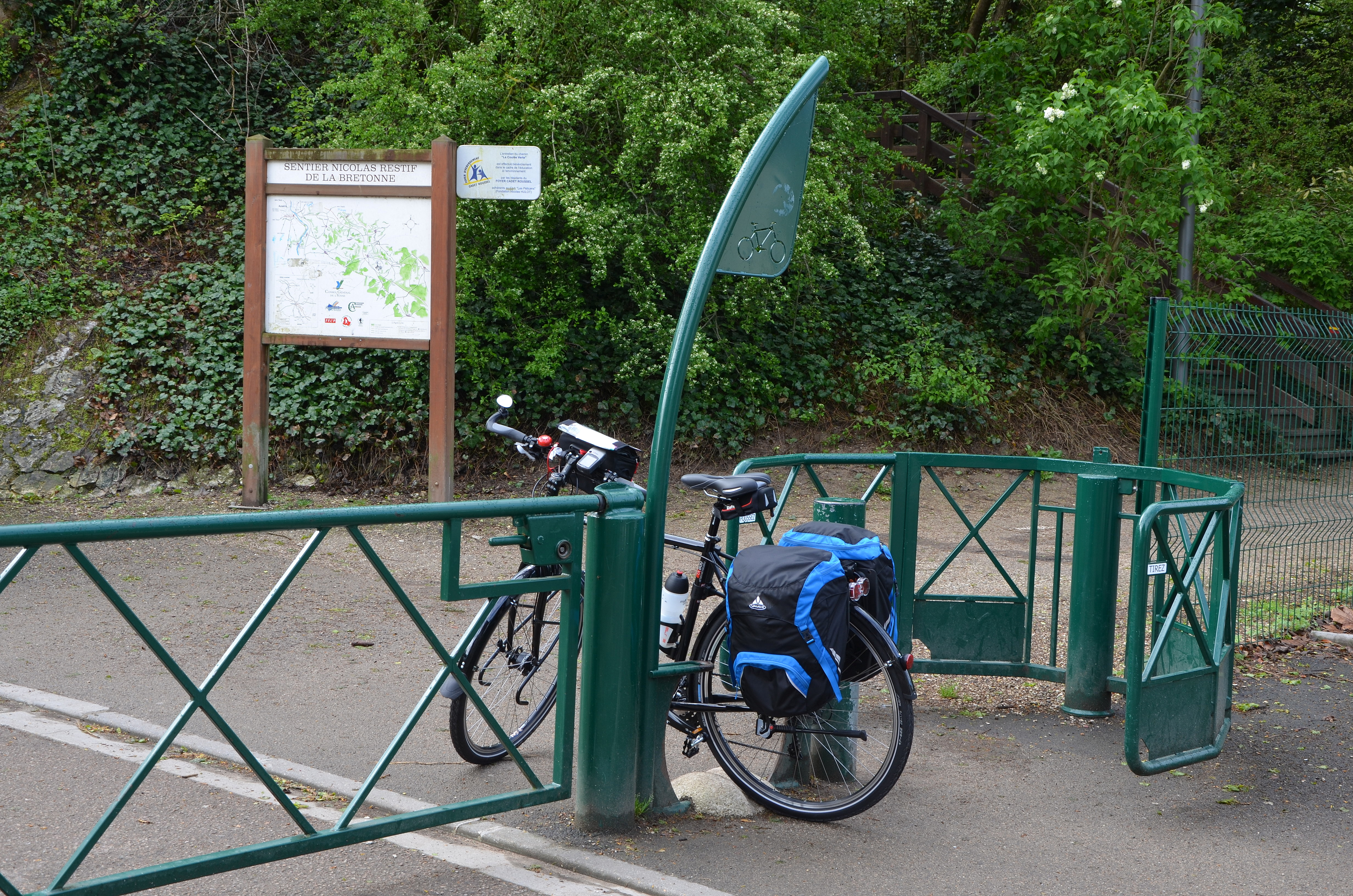 Véloroute du canal du Nivernais a Auxerre, Yonne, France